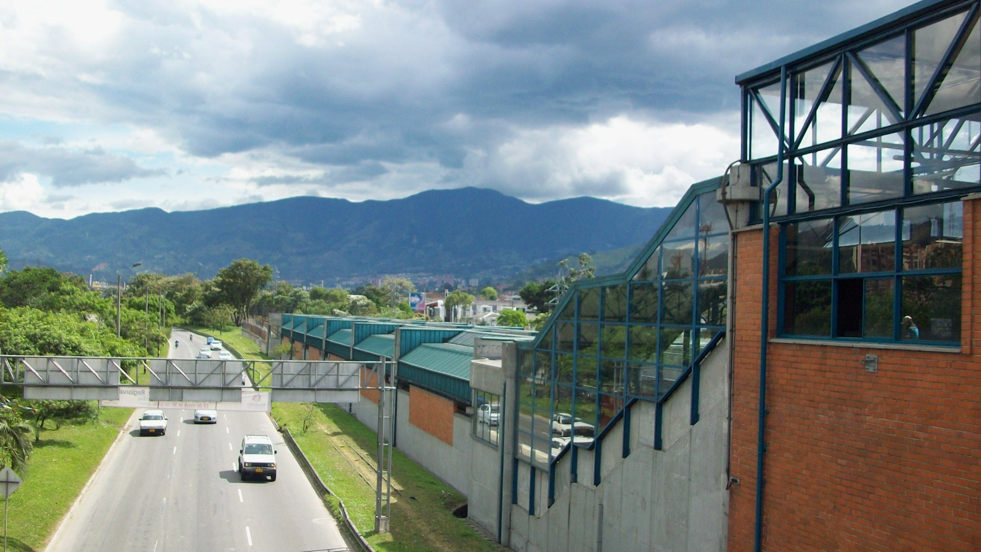 Estación Ayurá (Metro de Medellín)